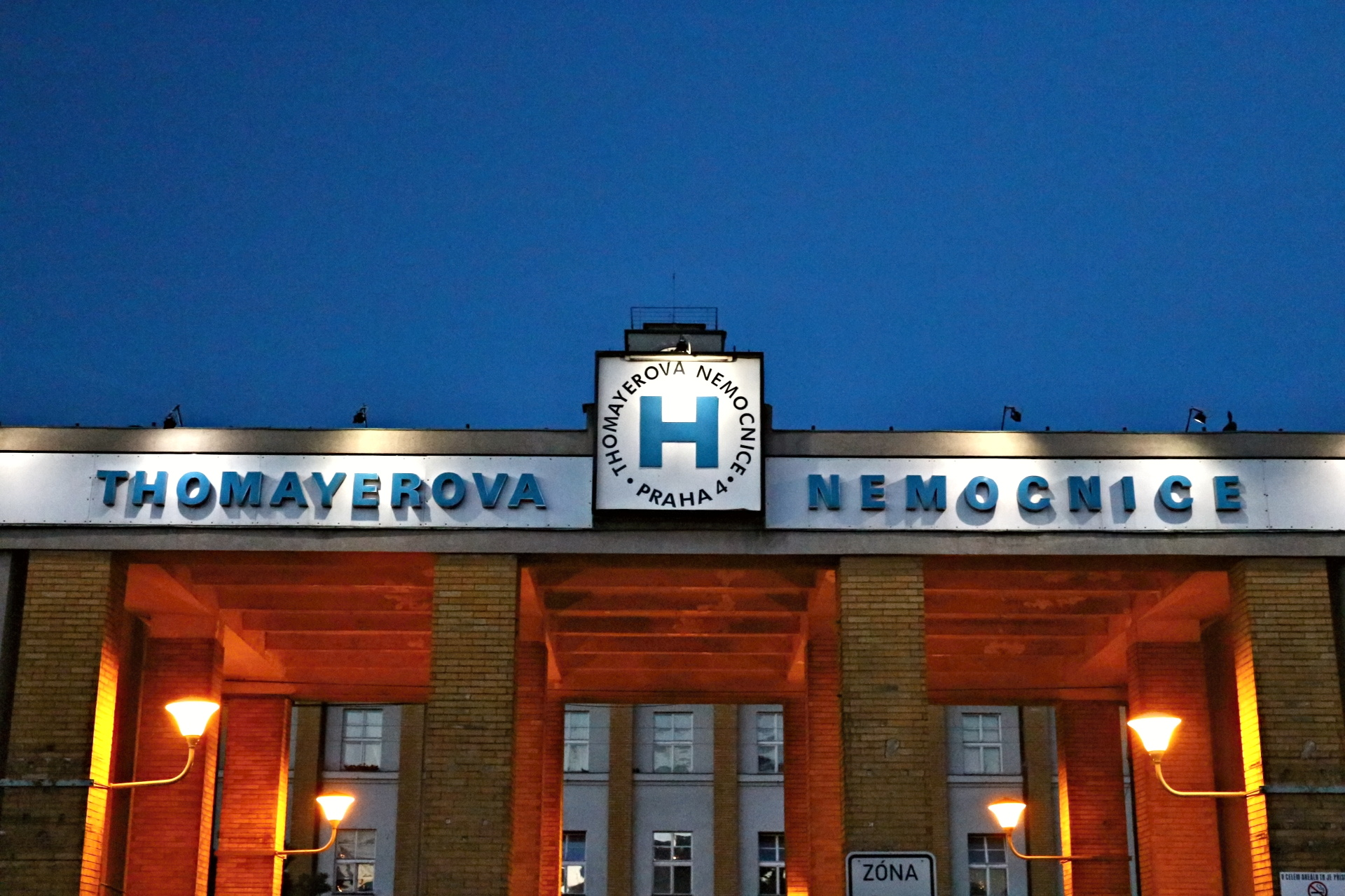 Thomayerova nemocnice v Krči